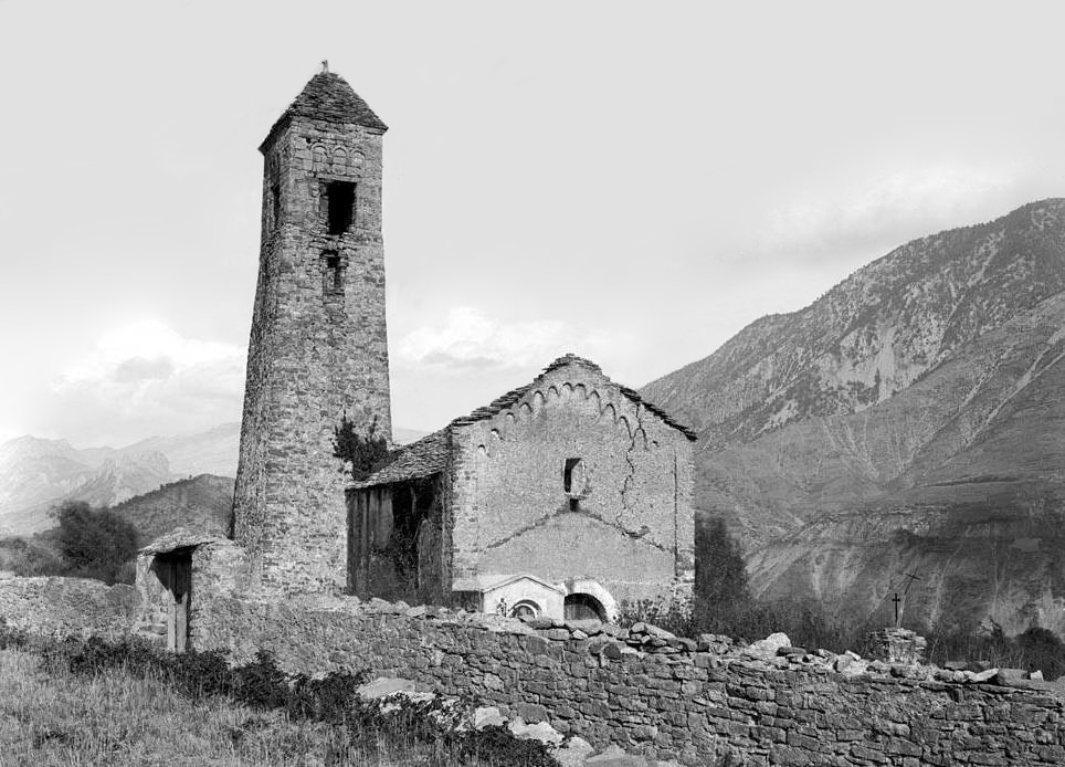 Imatge